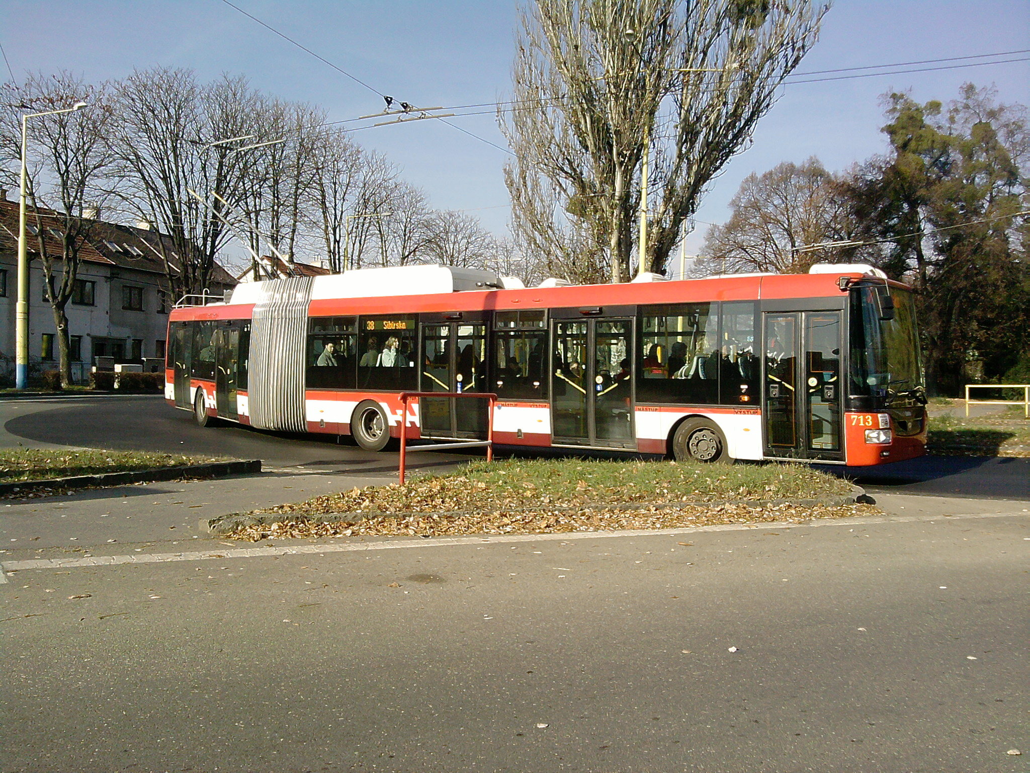 Trolejbus Škoda 31Tr SOR na Sídlisku II odbočuje z ul. Obrancov mieru na ul. 17. novembra.